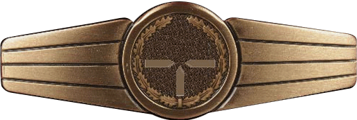 Tätigkeitsabzeichen für Scharfschütze/Präzisionsschütze der Bundeswehr Voraussetzungen: Nach erfolgreichem Abschluss des Verwendungslehrgangs Scharfschütze G22. Ausführung: Kreis mit stilisierter Visiereinrichtung im Eichenlaubkranz, beidseitig mit vier Streifen eingefasst, metallgeprägt; bronze-, silber- oder goldfarben.